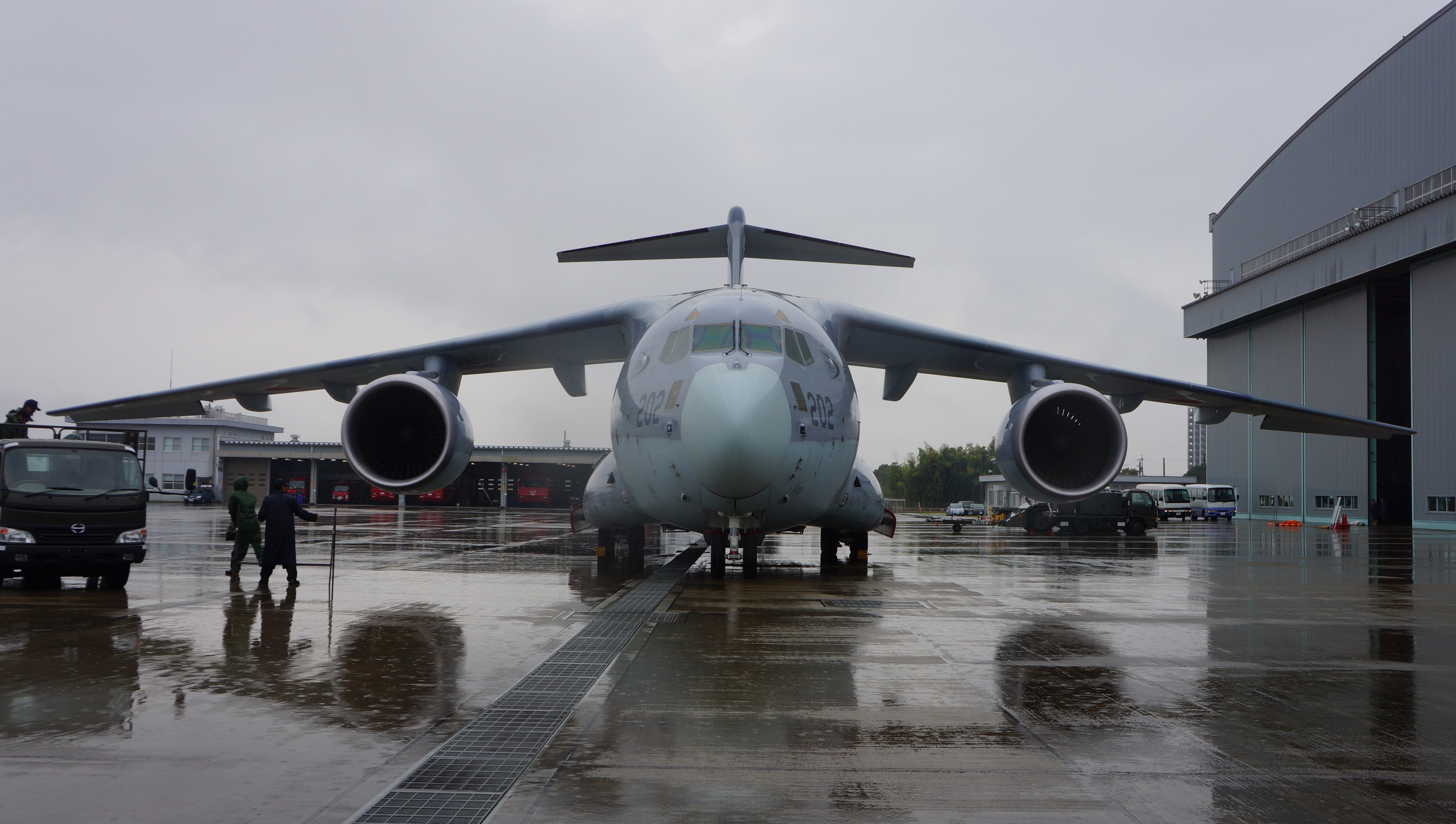 XC-2 202号機を正面より、2012年10月28日航空自衛隊岐阜基地にて。